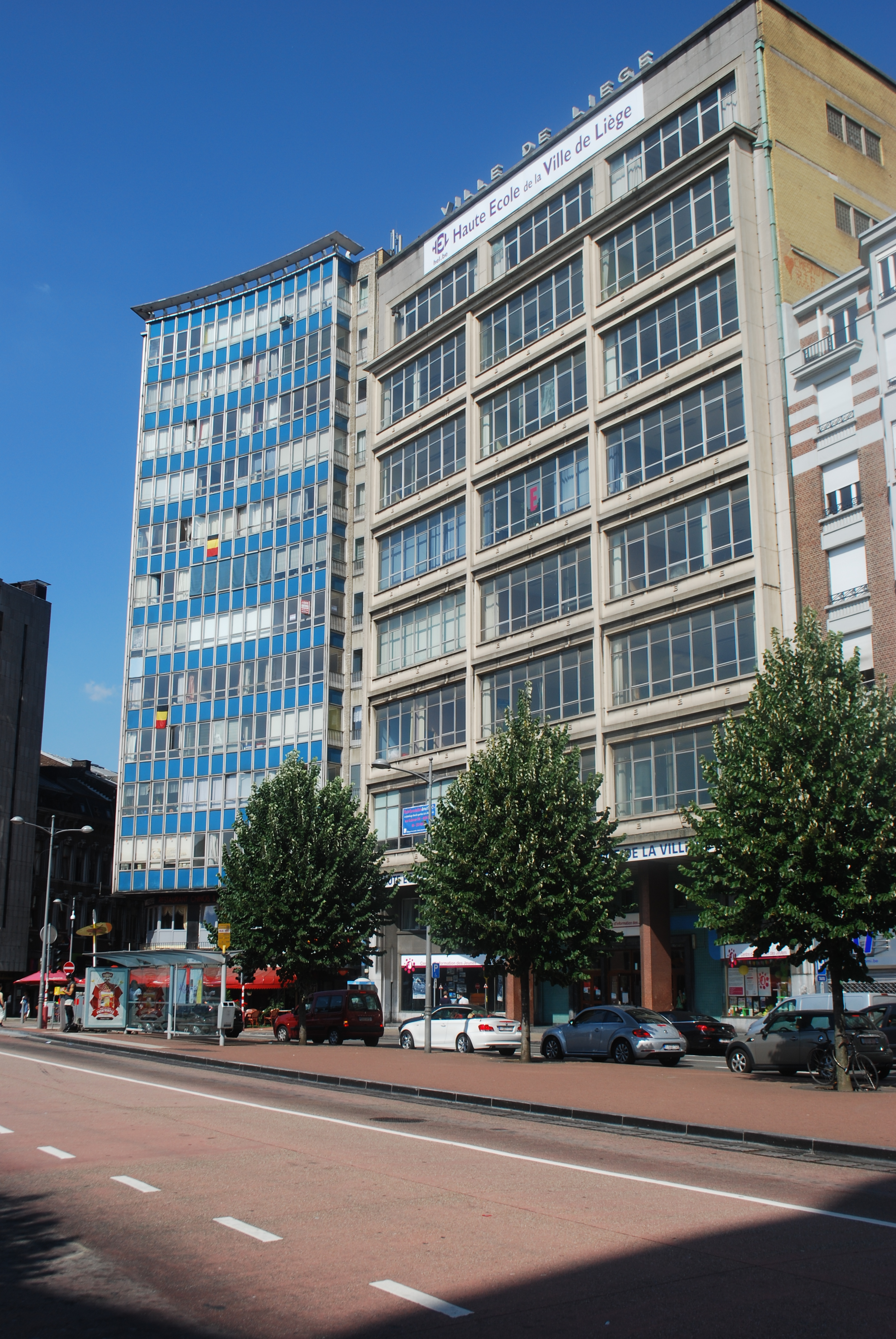 Vue du boulevard d'Avroy à Liège.